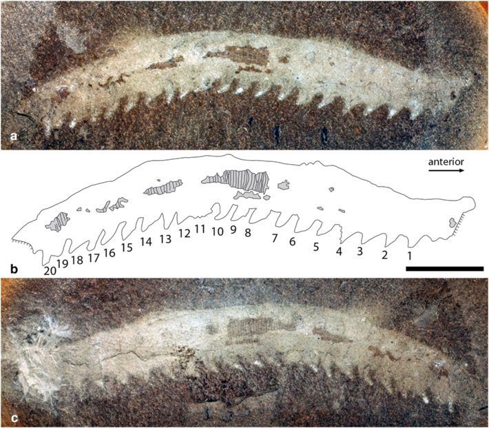 Holotype of Helenodora inopinata (FMNH PE29049). a Part and (c) counterpart, from the Francis Creek Shale, Westphalian D, Middle Pennsylvanian. Specimen preserved in lateral aspect and photographed wet under cross-polarised light. b Camera lucida drawing of part shows body outline and outline of limbs, as well as patches of annulated cuticle, shaded in grey. Note the dark patches outside the body margin ventral to limbs 5, 7 and 9. Details of both the anterior and posterior ends are not preserved, despite attempts to excavate the anterior of the counterpart (b) by Thompson & Jones [8]. Numbers refer to walking limbs from anterior to posterior. ann = trunk annulae. Scale bar = 10 mm. High resolution versions of each photograph provided in additional materials (Additional file 2)